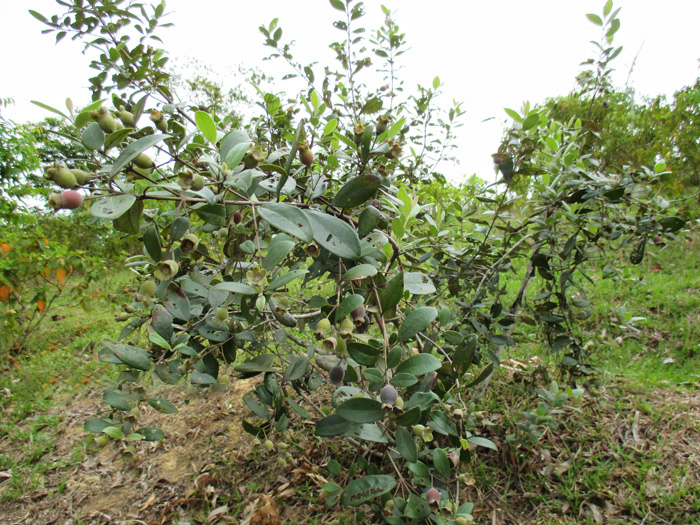 Ảnh sim sưu tầm